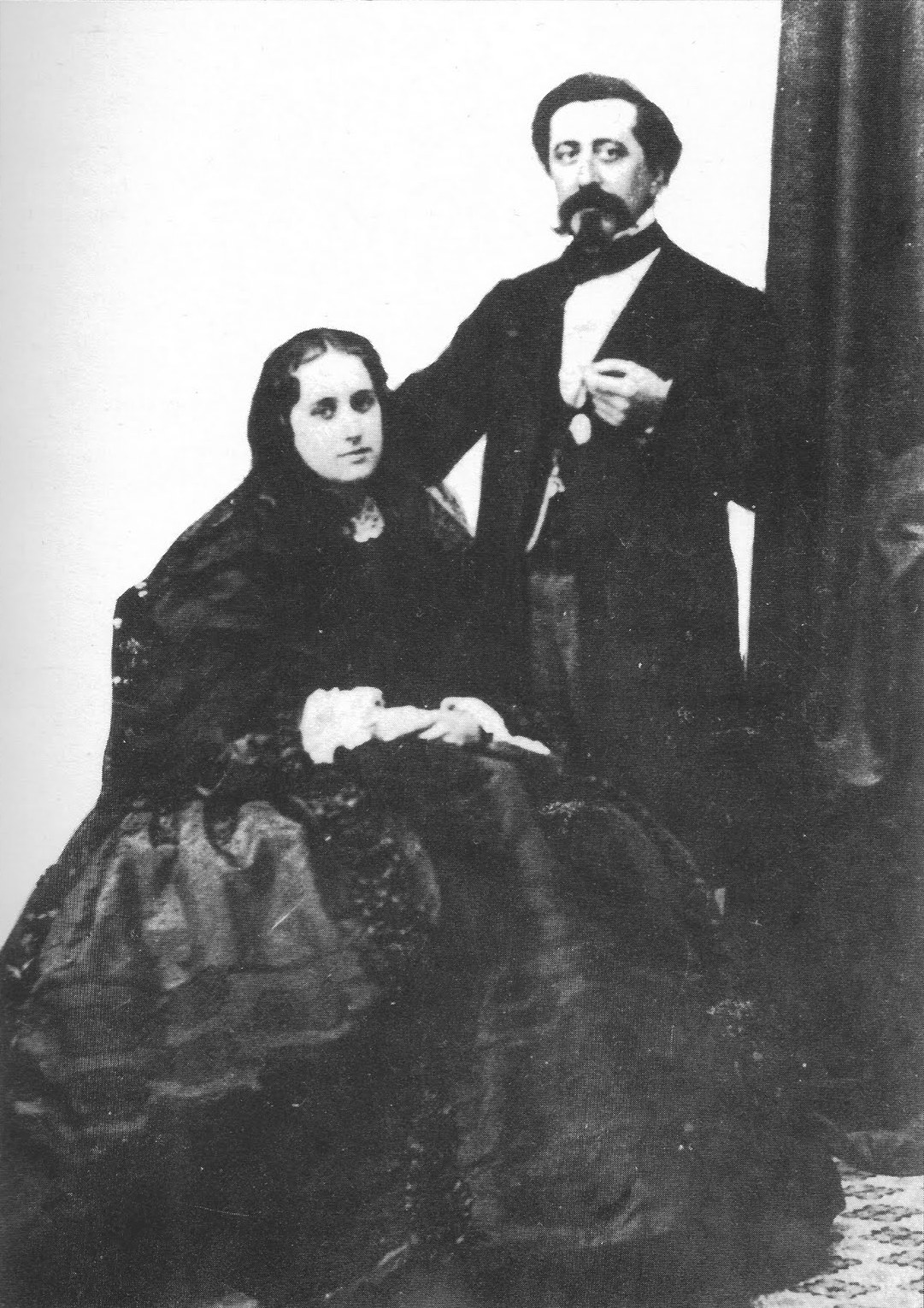 Marcial del Adalid y Fanny Garrido.